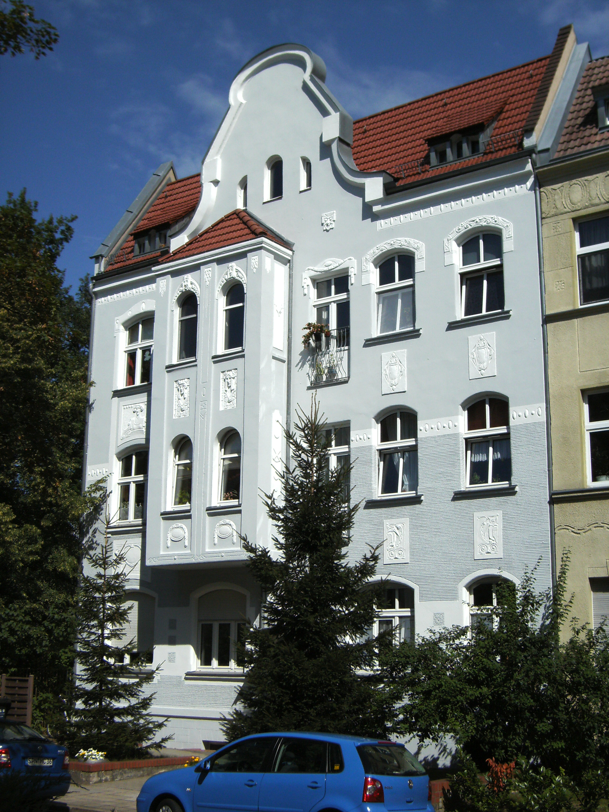 Wernerstr. 33